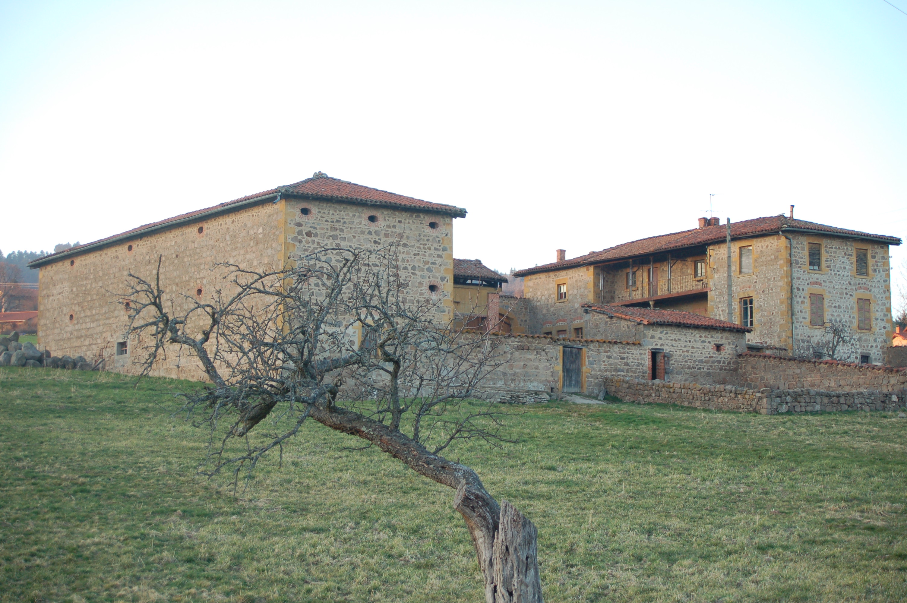 Ferme typique des Monts du Lyonnais